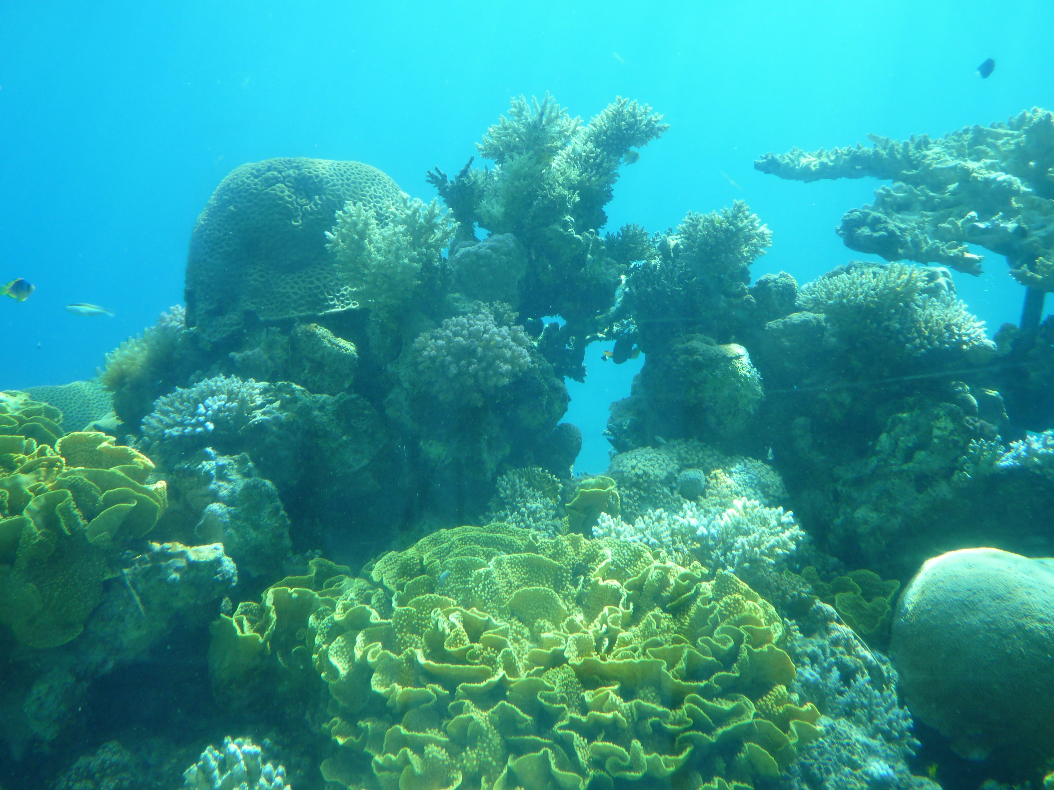 P1080795 Eilat